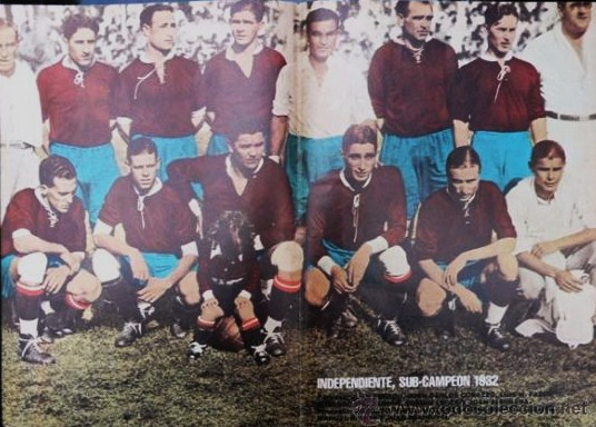 plantel de Independiente sub campeón 1932